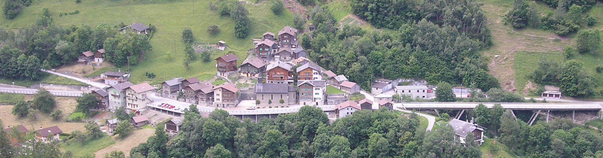 Hameau de La Luette, commune de Saint-Martin, dans le val d'Hérens, Valais, Suisse